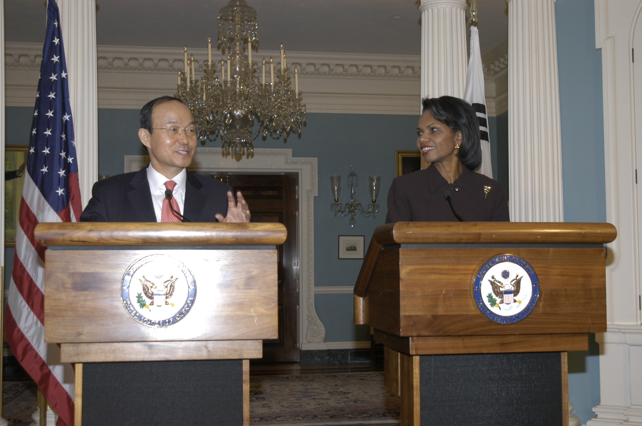 송민순 전 외교통상부 장관과 콘돌리자 라이스 전 미국무부 장관